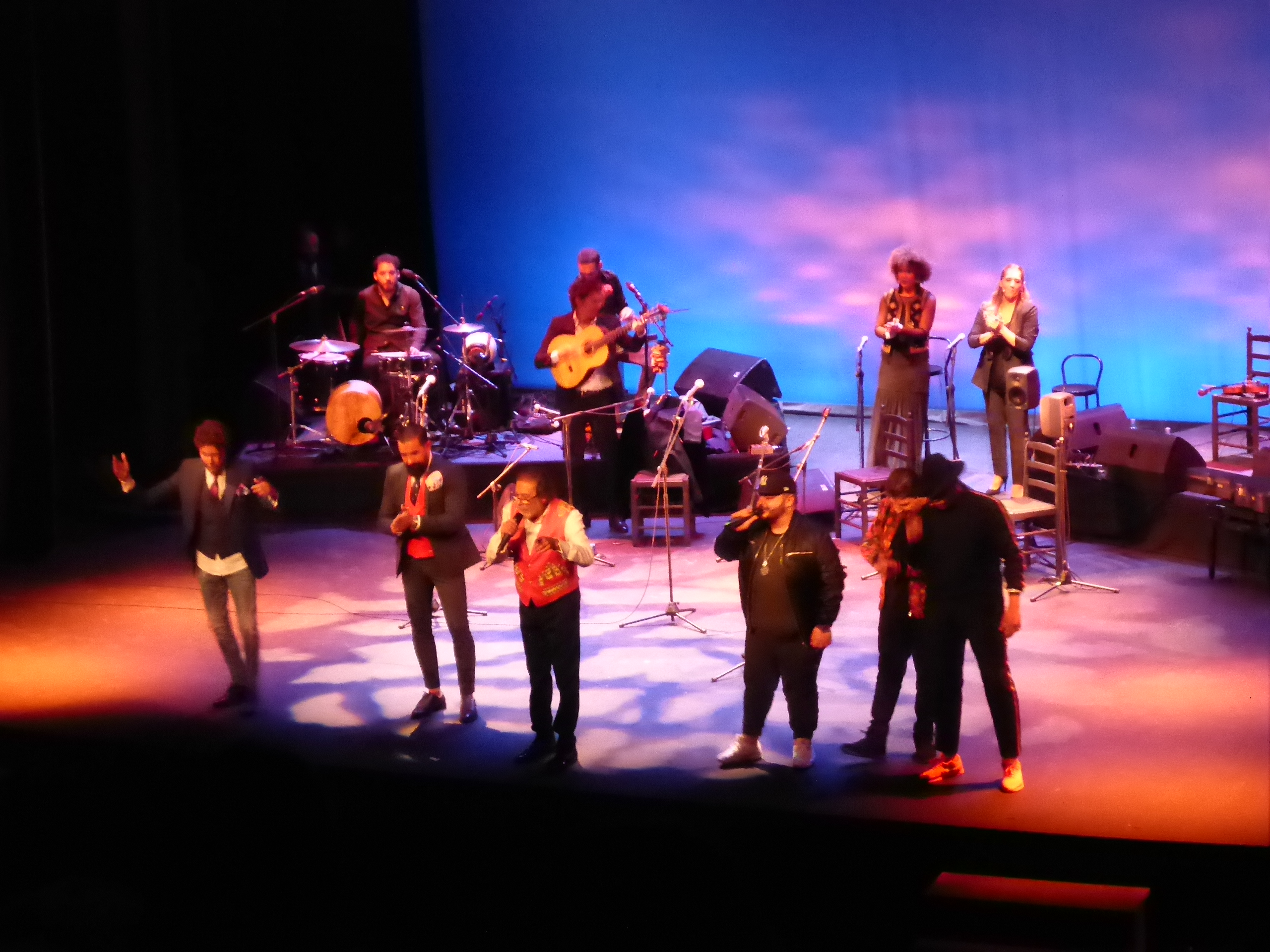 Diego Carrasco, concierto gira "No marrecojo", en el teatro Villamarta de Jerez de la Frontera (España) con Juan de la Morena, Maloko y Gipsy Rappers